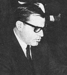 Fotografía Juan María Bordaberry, presidente constitucional de Uruguay entre 1972 y 1973 y de facto entre 1973 y 1976.